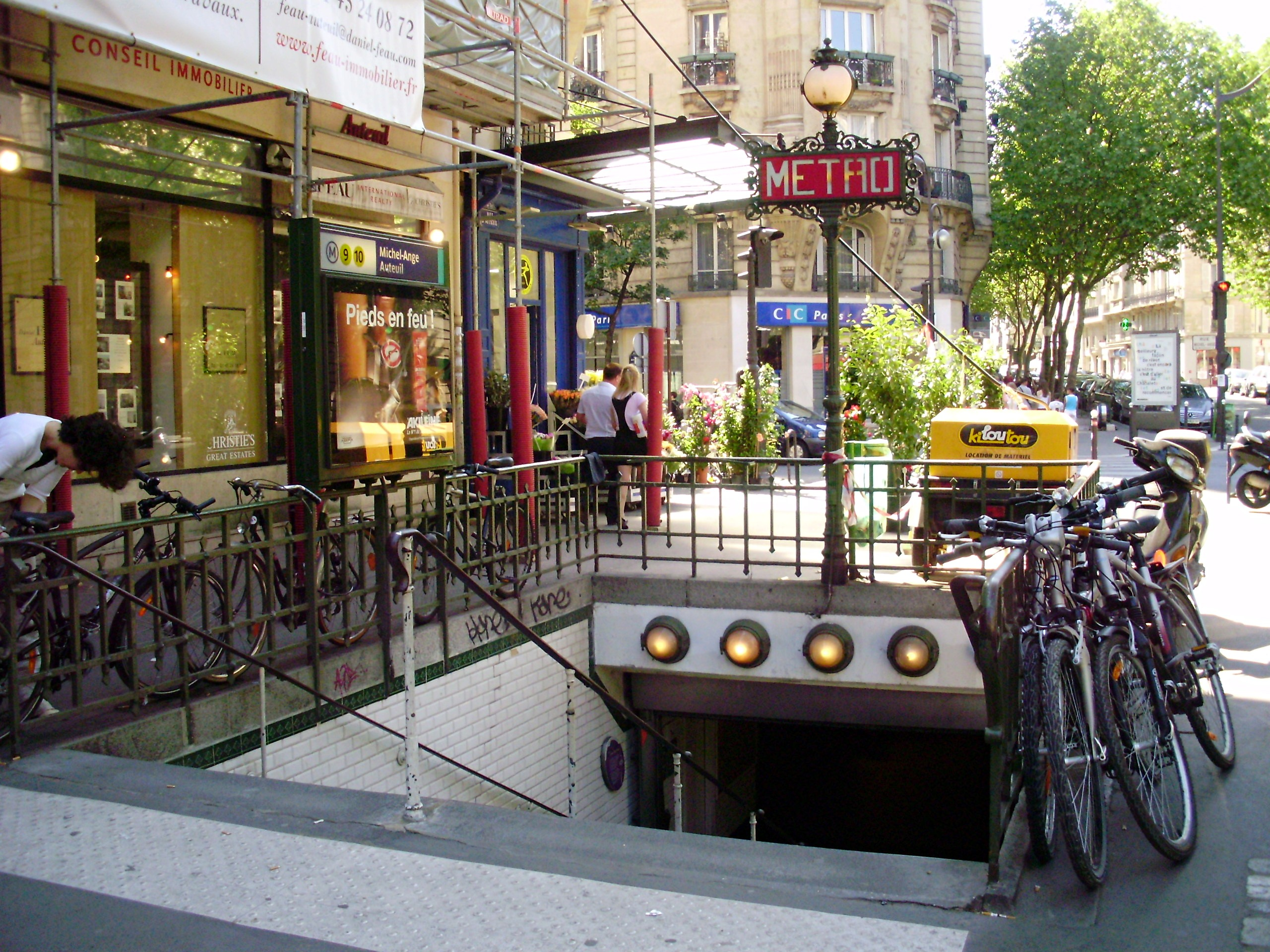 Entrée de la station de métro Michel-Ange - Auteuil avec candélabre Val d'Osne, Paris, France.